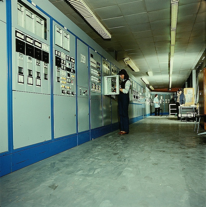 Original image description from the Deutsche FotothekFacharbeiter für Glastechnik